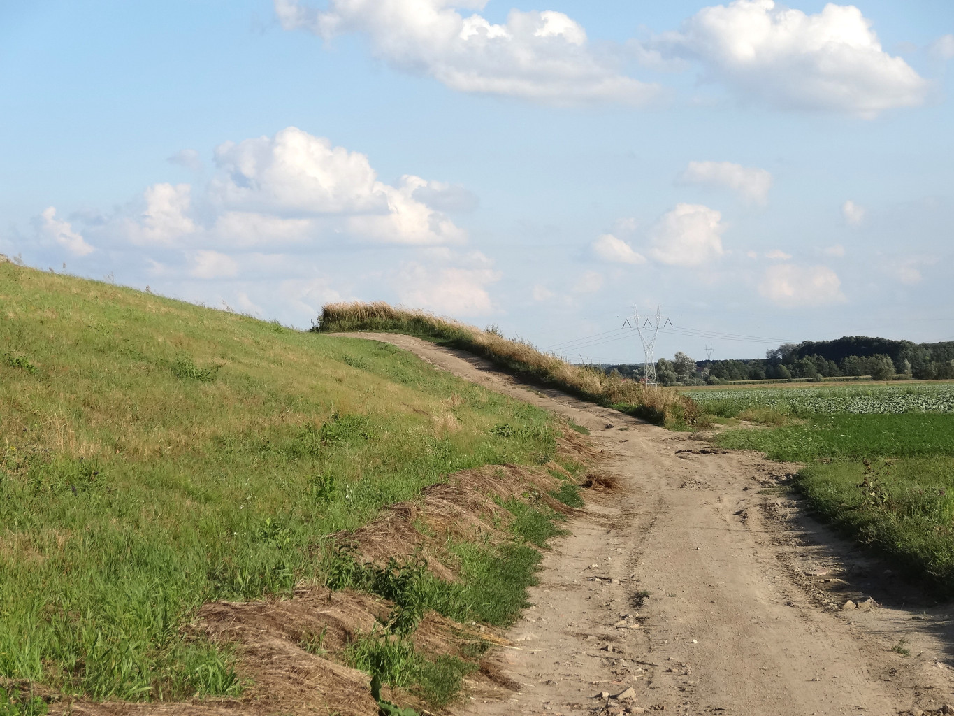 Pola uprawne na dawnych terenach zalewowych Wisły w Bydgoszczy-Łęgnowie. Widoczny przejazd przez wiślany wał przeciwpowodziowy